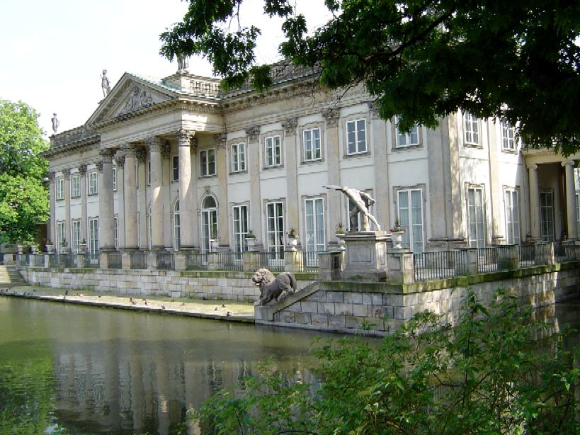 нациѕам